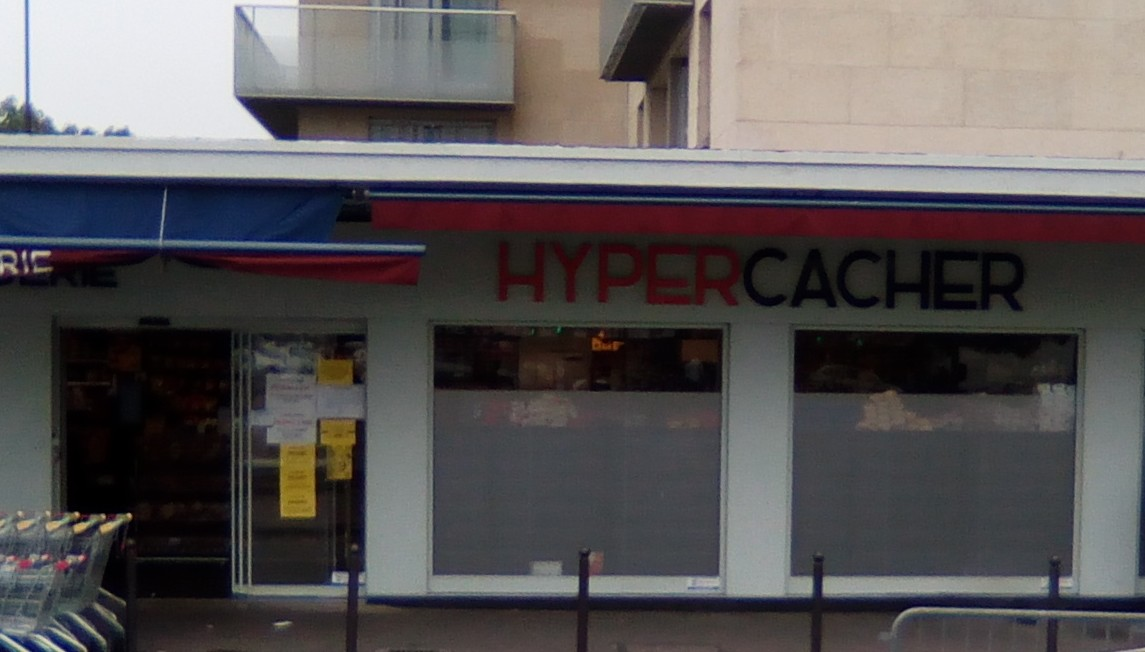 La supérette Hyper Cacher de la porte de Vincennes.